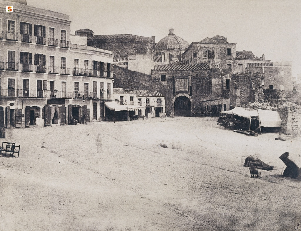 La porta, distrutta, di Stampace.